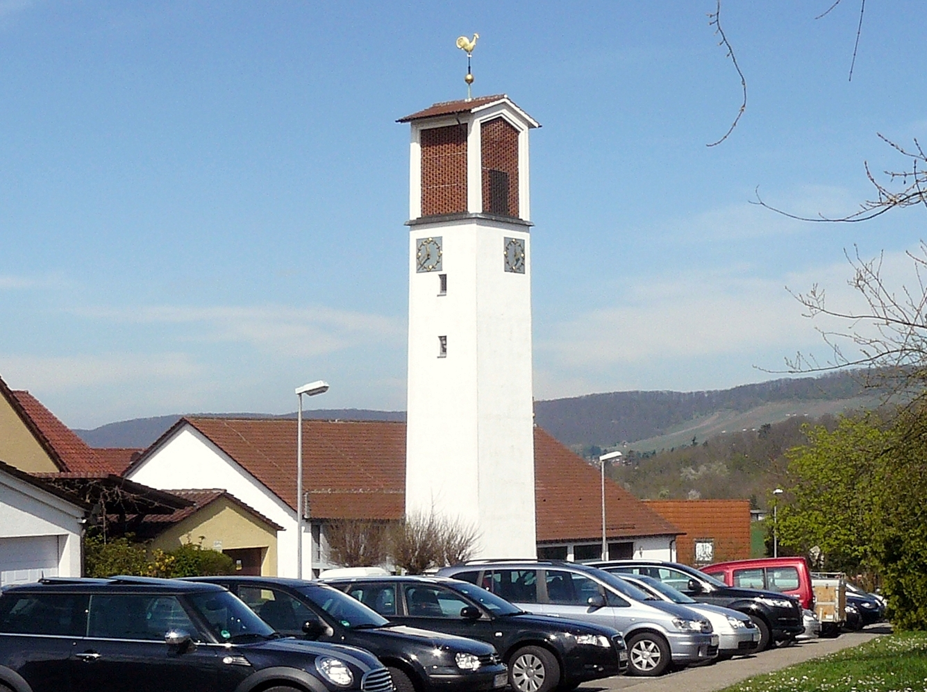 1958 erbaute Christuskirche in Kleinglattbach (Vaihingen an der Enz)